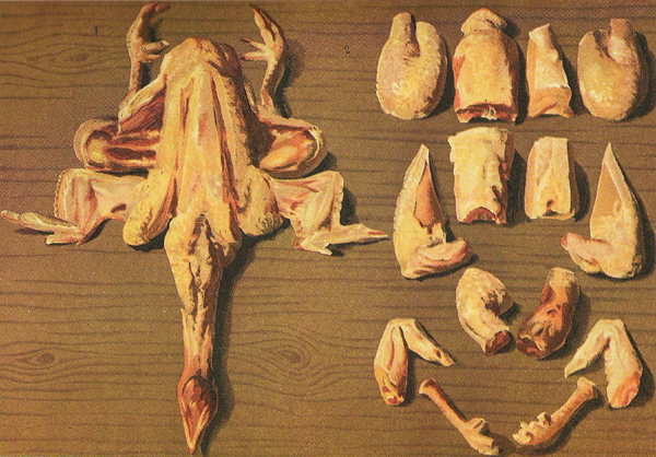 Photographie d'une planche en couleur du « Livre de cuisine » de Jules Gouffé (1867)